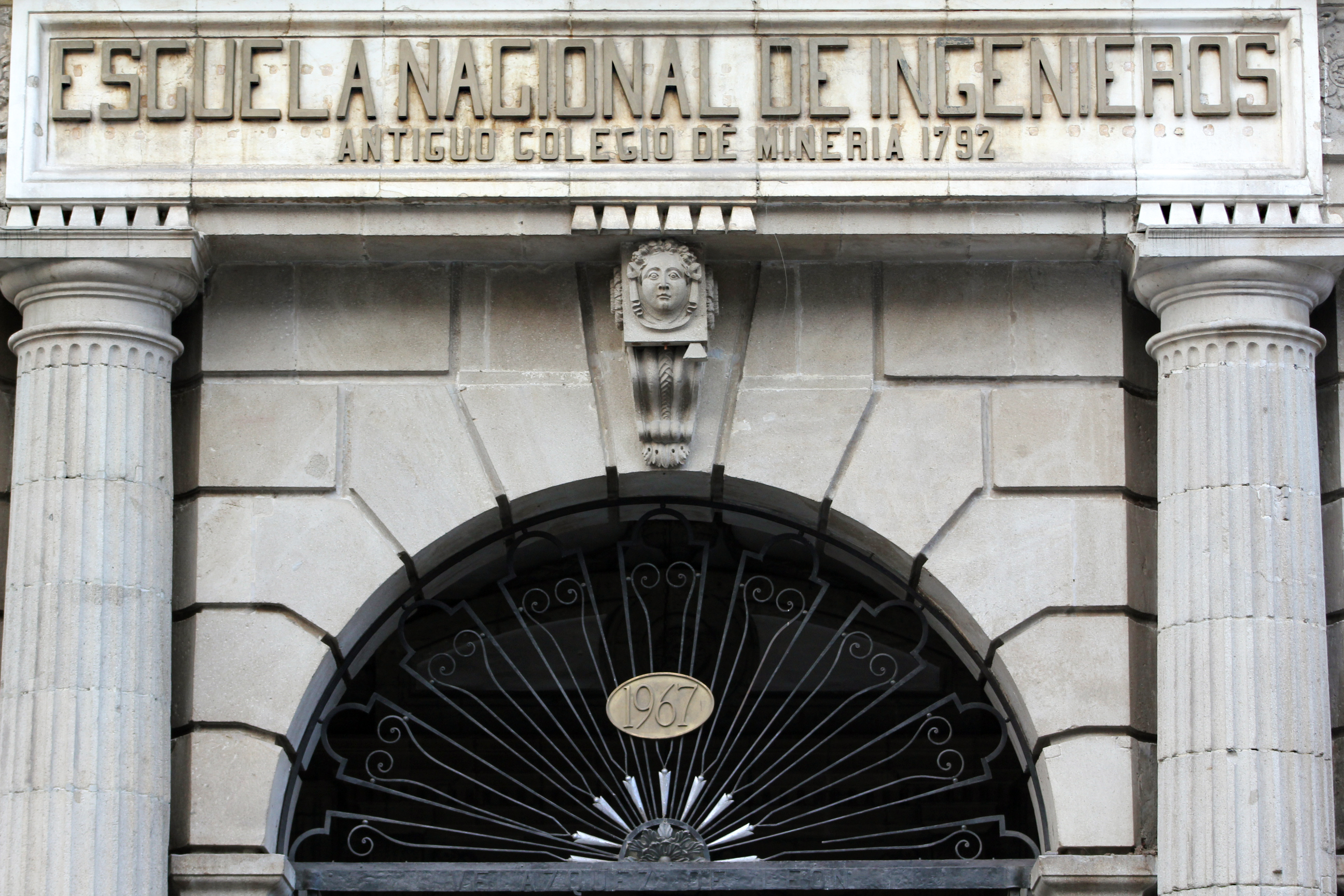 Detalle del portón principal.